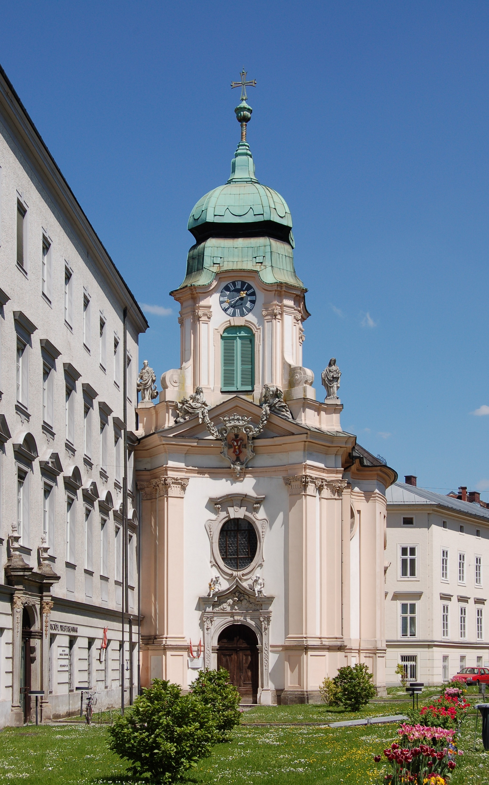 Priesterseminarkirche in Linz, Außen